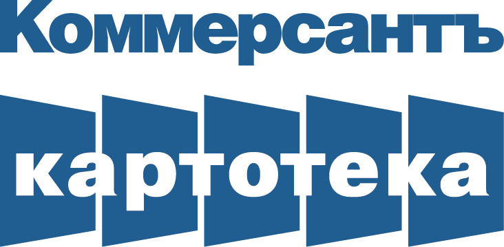 Логотип Коммерсантъ Картотека